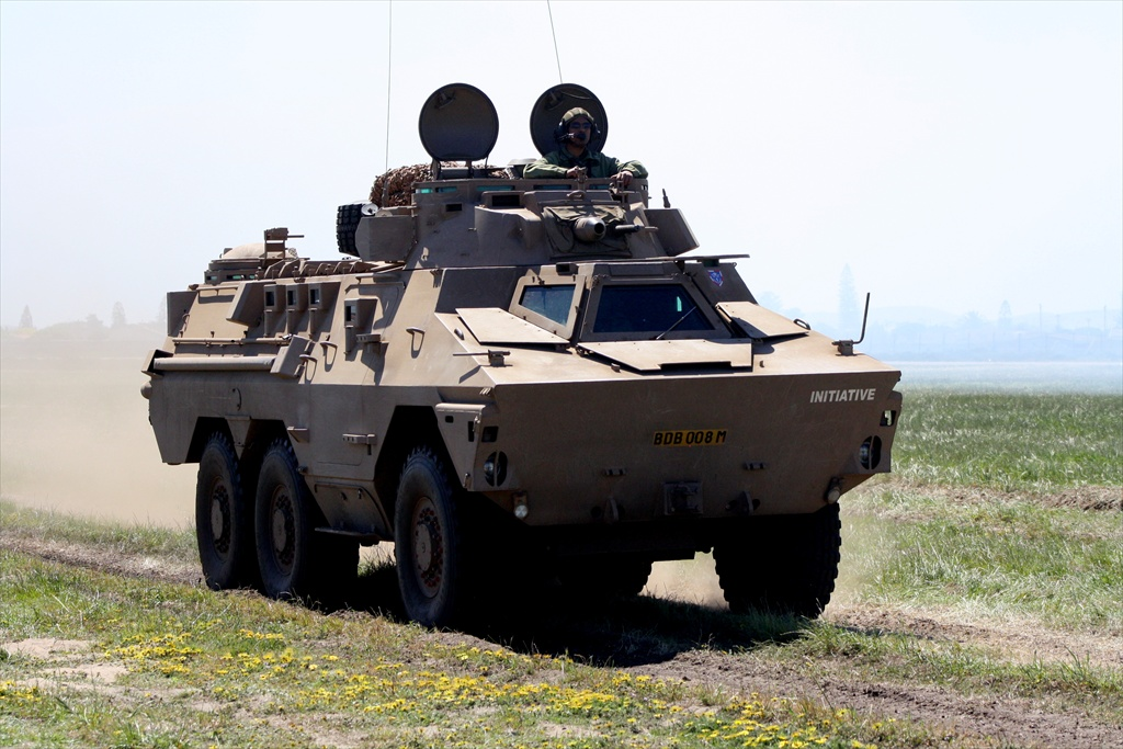 Ratel 6X6 APC